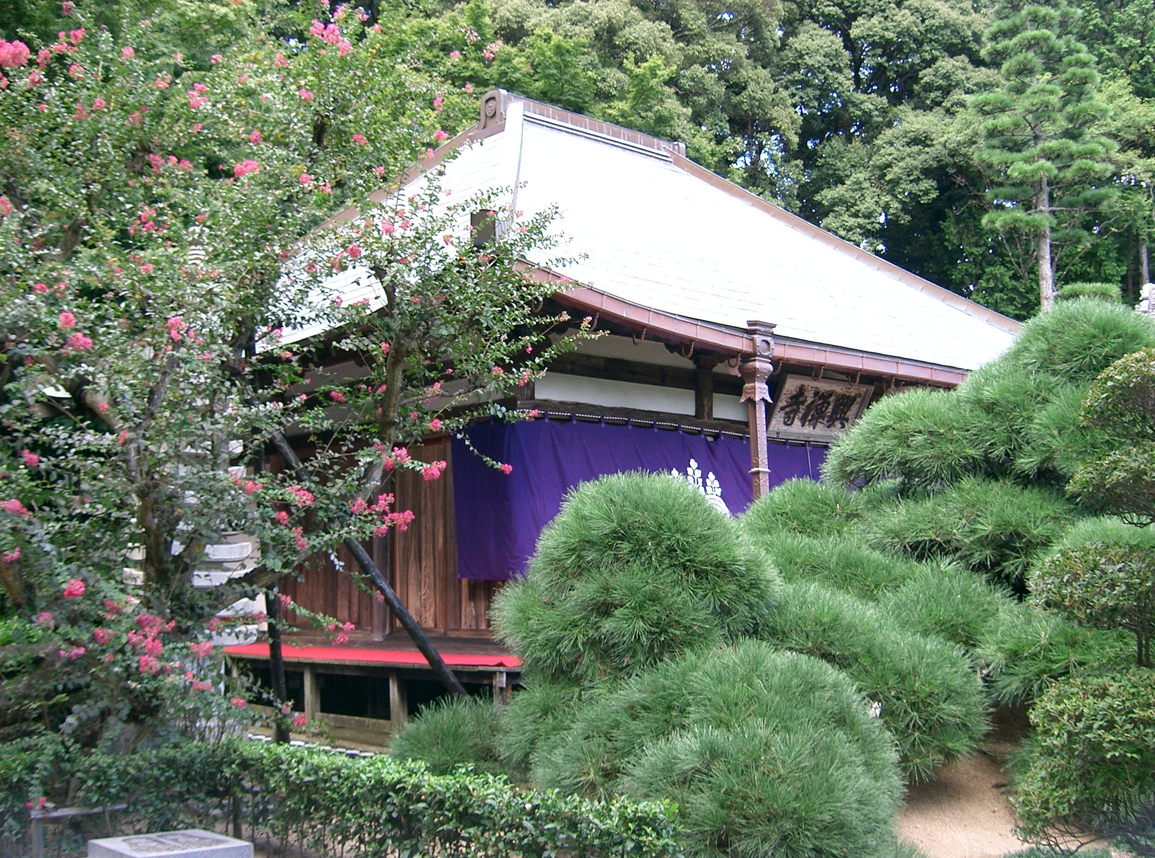 興禅寺